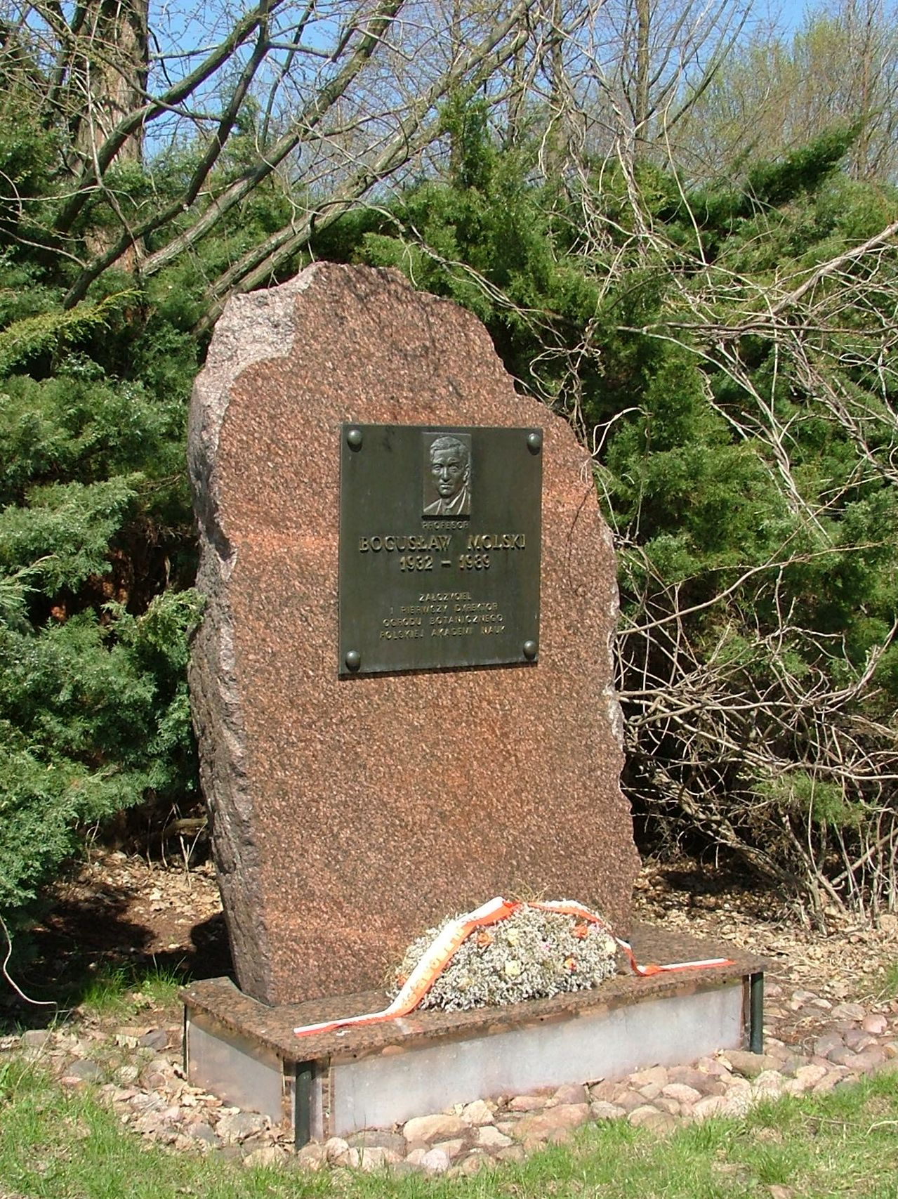 Powsin. Ogród Botaniczny – Centrum Zachowania Różnorodności Biologicznej PAN w Warszawie. Pomnik pierwszego dyrektora ogrodu - prof. Bogusław Molski (1932-1989).